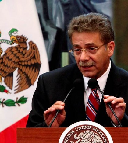 Gobernador de san luis